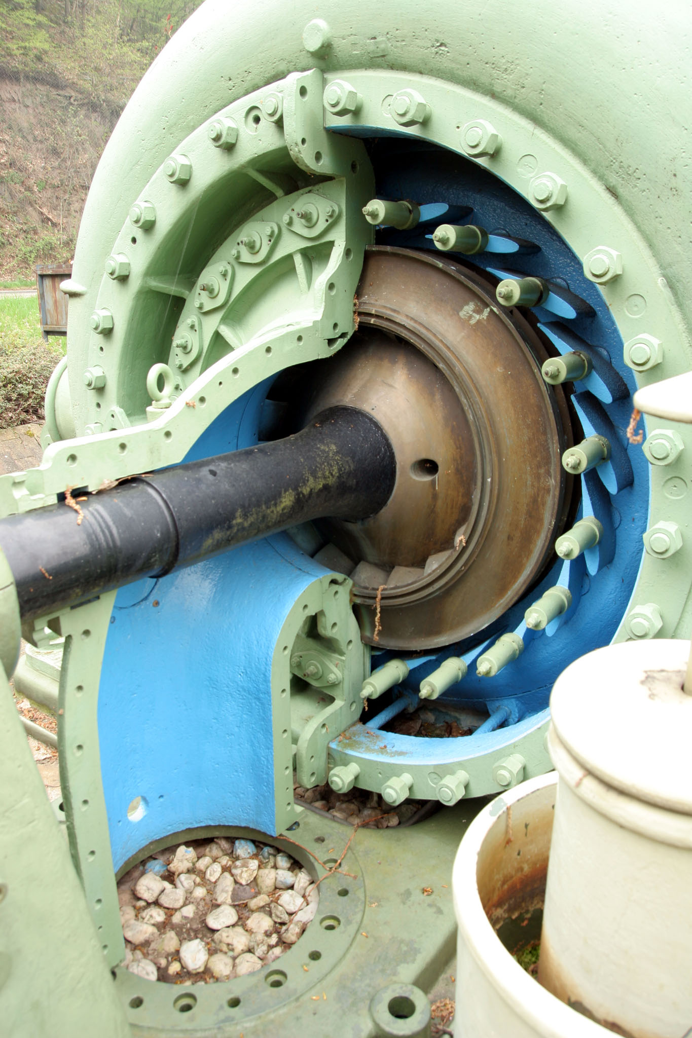 Industriedenkmal am Moselkraftwerk Fankel, bestehend aus einem Francis-Turbinen-Generatorensatz, der aus dem Wasserkraftwerk Heimbach in der Eifel stammt.